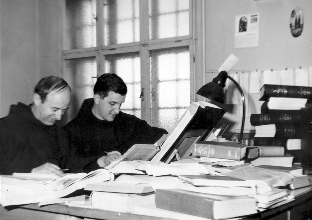 Bonaventura Duda (lijevo na slici) i Jerko Fućak (desno), bibličari